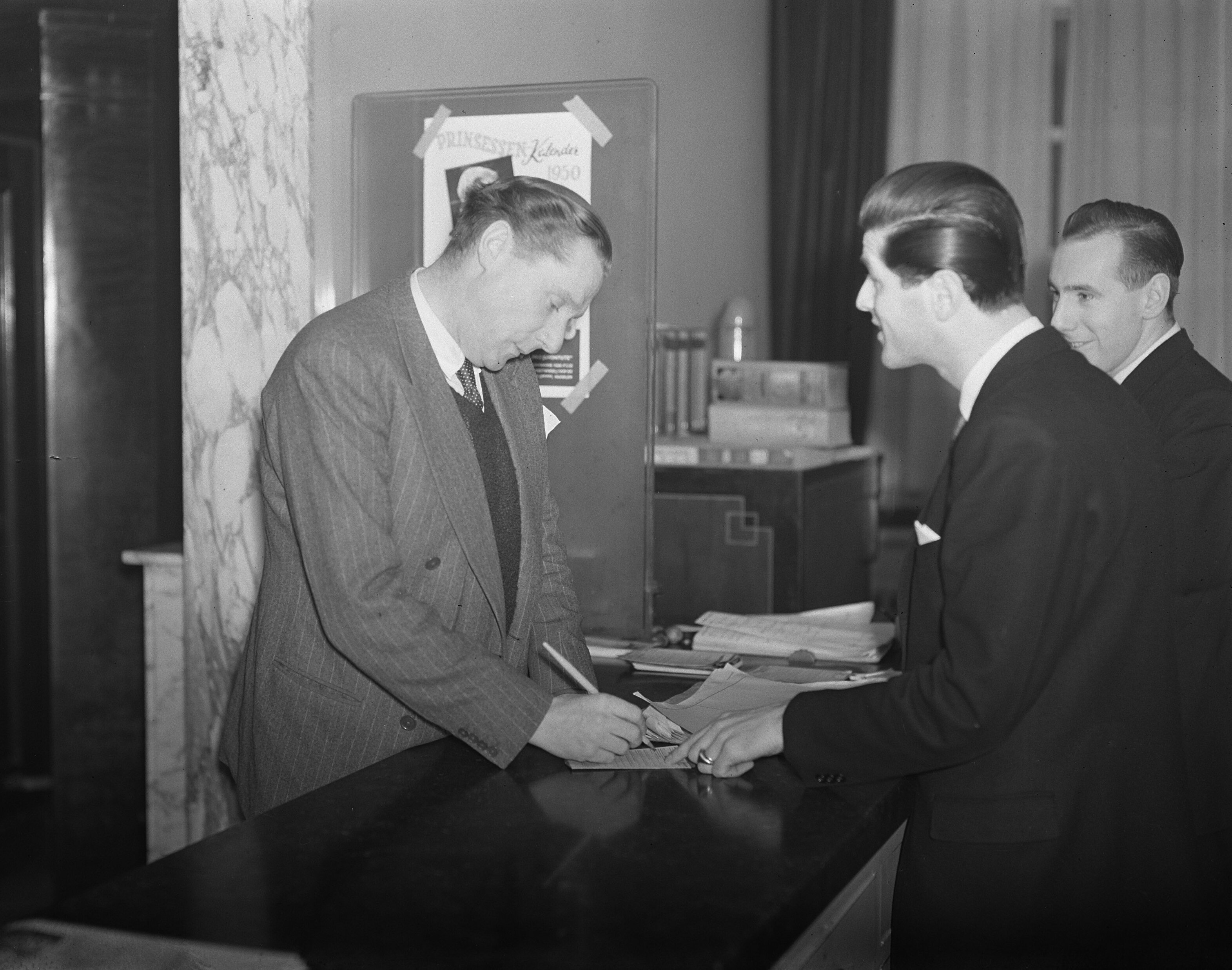 Collectie / Archief : Fotocollectie Anefo Reportage / Serie : [ onbekend ] Beschrijving : Fillmregisseur Carol Reed (van de film "The Third Man") in Amsterdam Datum : 20 januari 1950 Locatie : Amsterdam, Noord-Holland Trefwoorden : film, hotels, regisseurs Persoonsnaam : Reed, Carol Fotograaf : Nijs, Jac. de / Anefo Auteursrechthebbende : Nationaal Archief Materiaalsoort : Glasnegatief Nummer archiefinventaris : bekijk toegang 2.24.01.09 Bestanddeelnummer : 903-7969